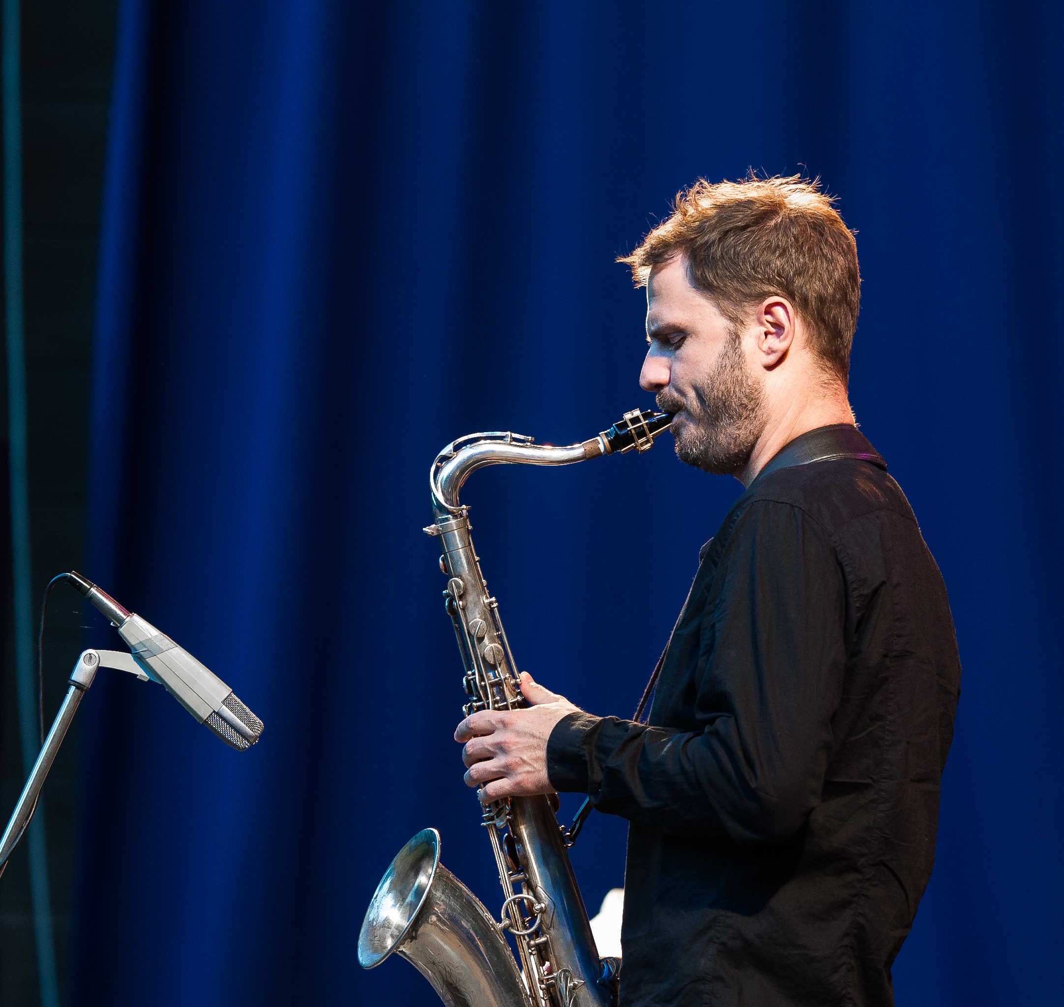 Max von Mosch @ Palmengarten Frankfurt, 14.08.2014